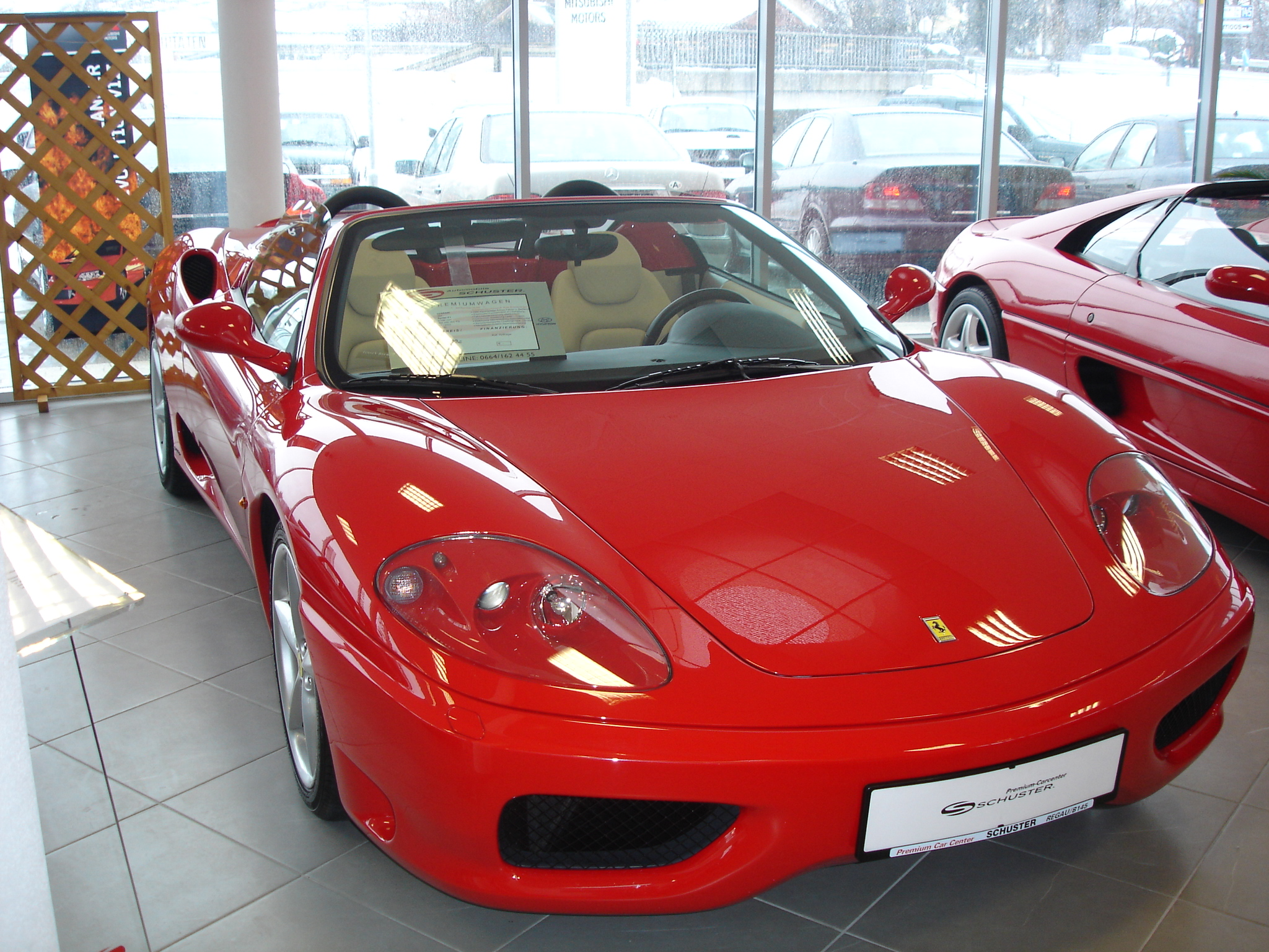 Beschreibung: Ferrari 360 Spider F1 Frontansicht mit geöffnetem Verdeck Datum: 11.2.2005 Quelle: Fotograf: Michi1308